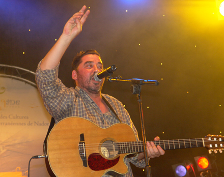 الفنان الوليد ميمون Walid mimoun